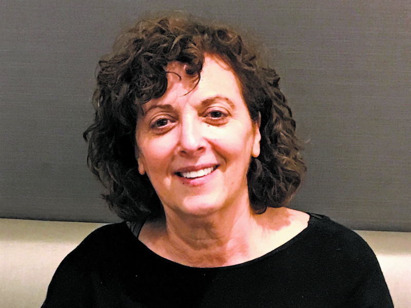 טובה הרטמן